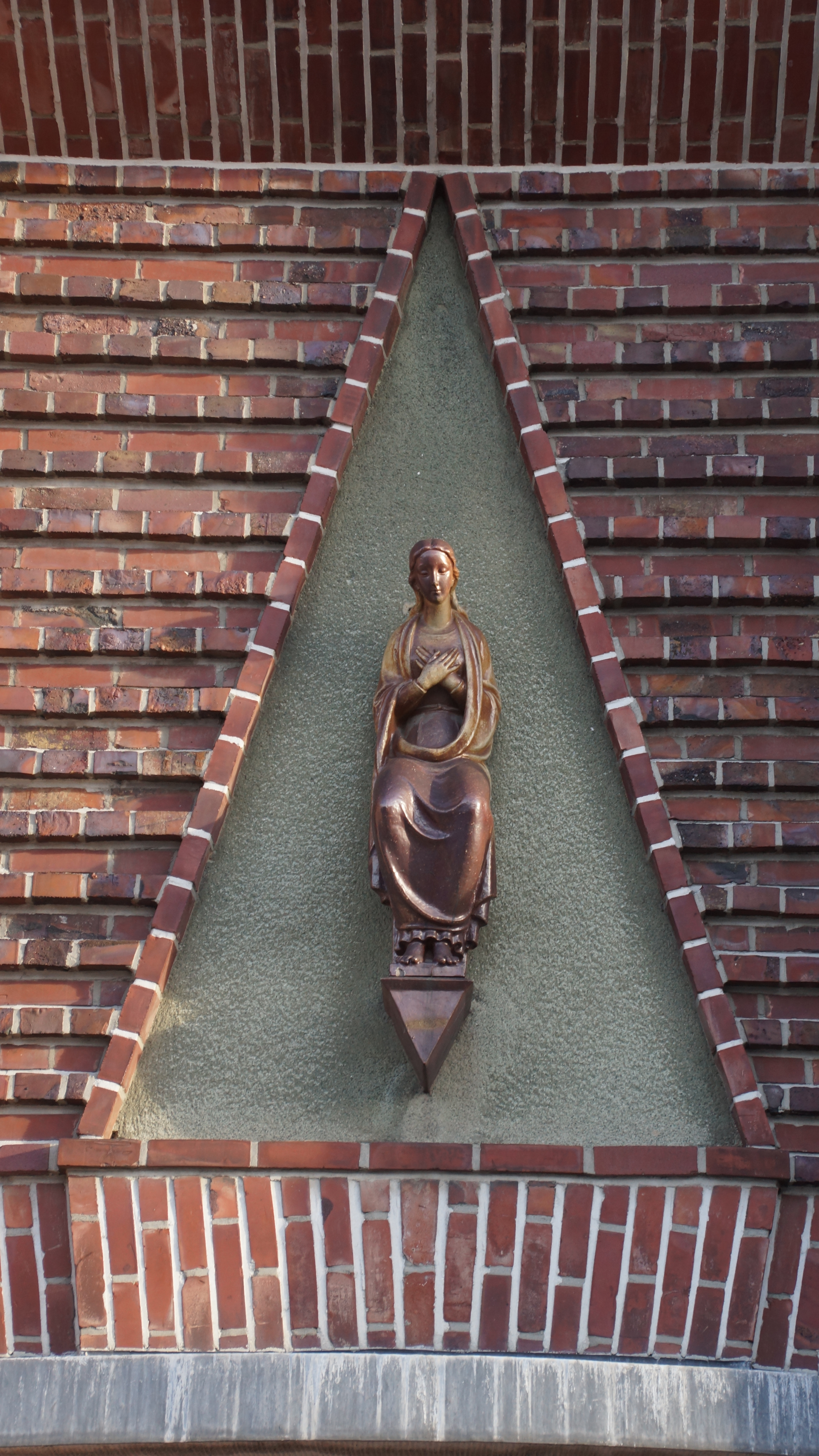 Madonna an der katholischen Kirche St. Marien in Weiden, Goethestr. 31